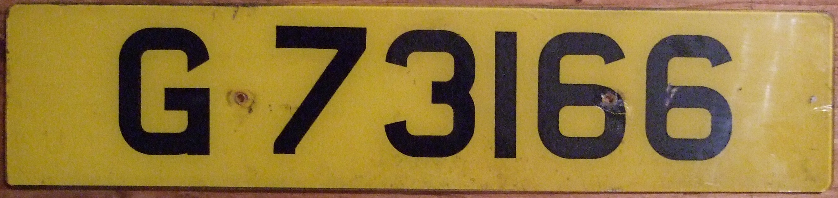 GIBRALTAR c.2005 ---YELLOW REAR PLATE